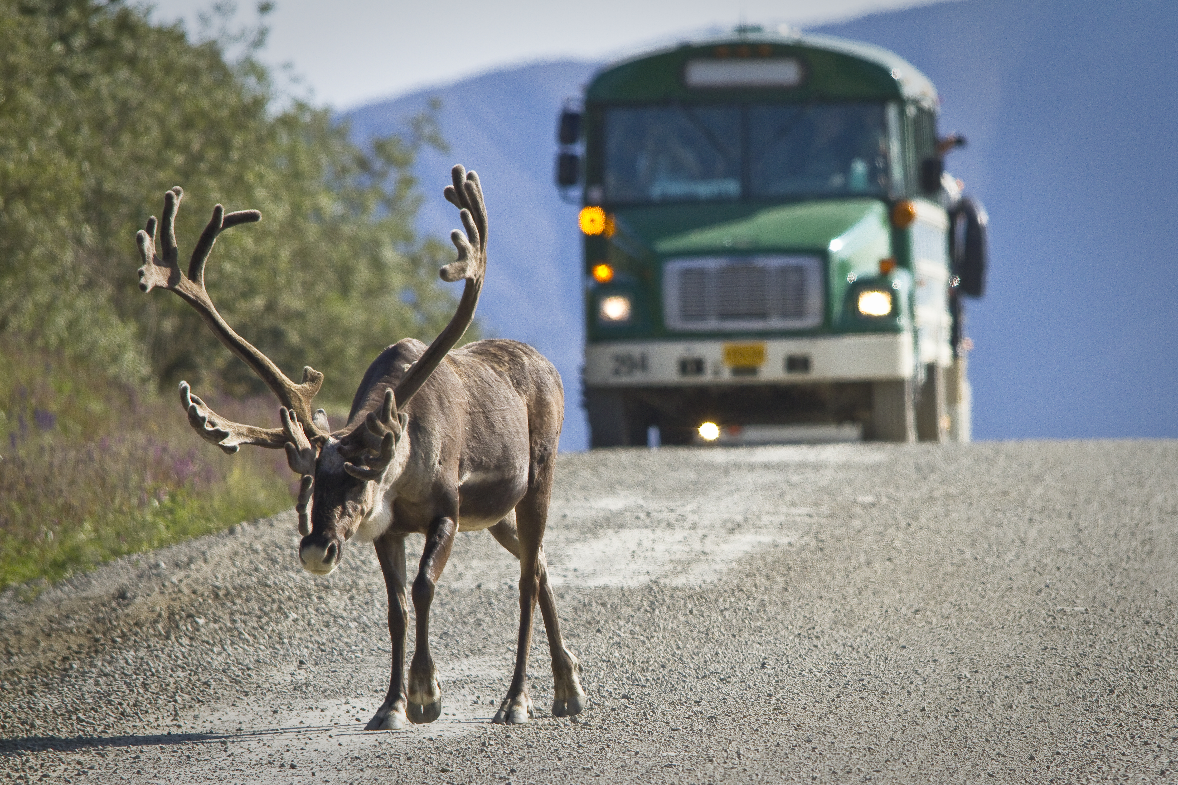 NPS / Jacob W. Frank